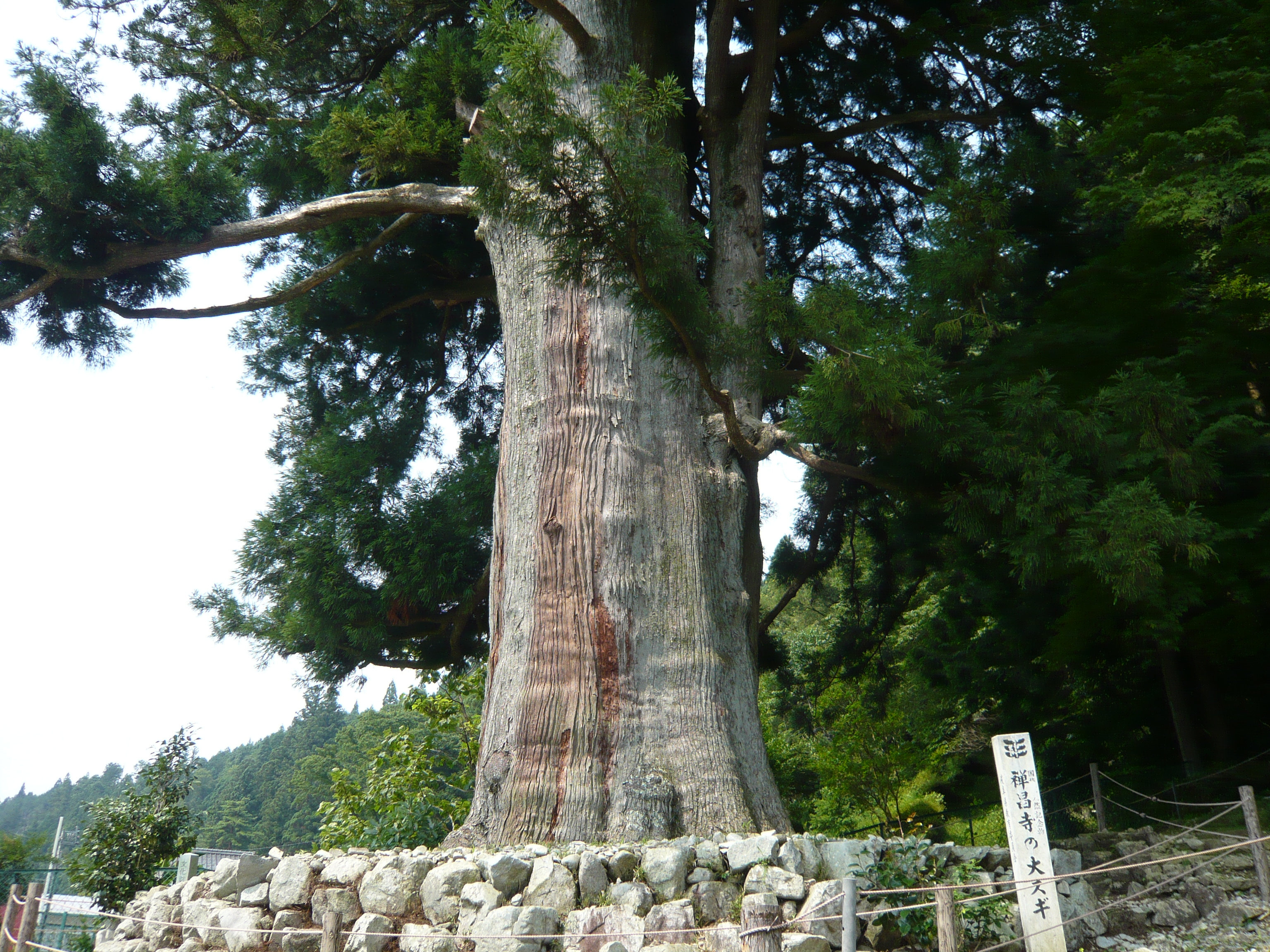 下呂市萩原町中呂の禅昌寺。大杉。